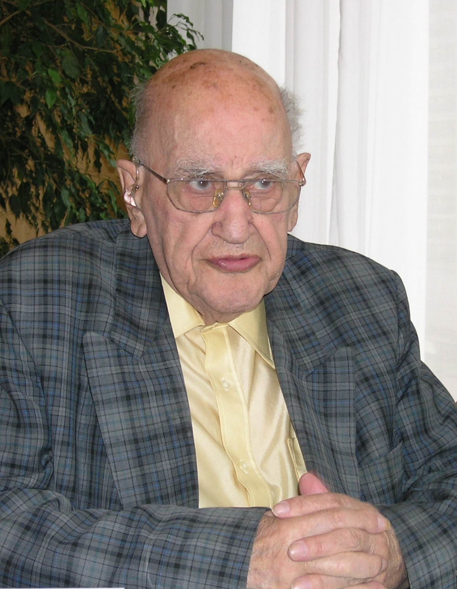 Ernst Federn, 30.4.2006; eigene Aufnahme